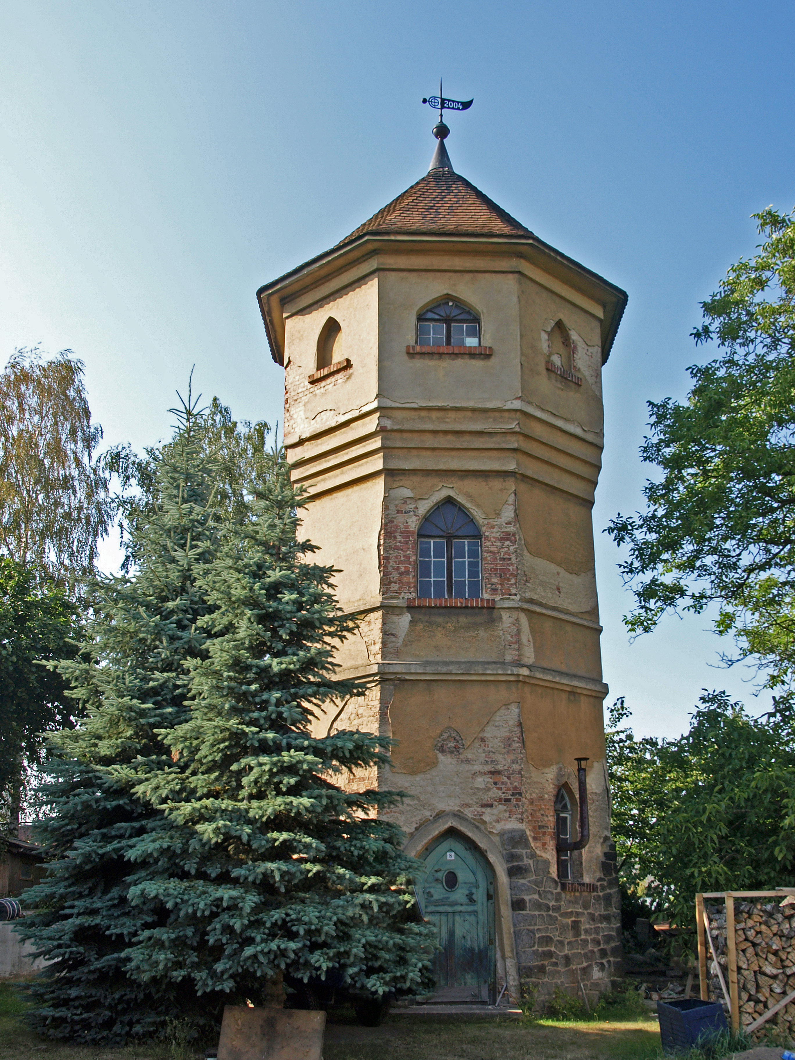 Wasserturm in Baruth (Malschwitz) Hornjoserbsce: Wodowa wěža w Barće